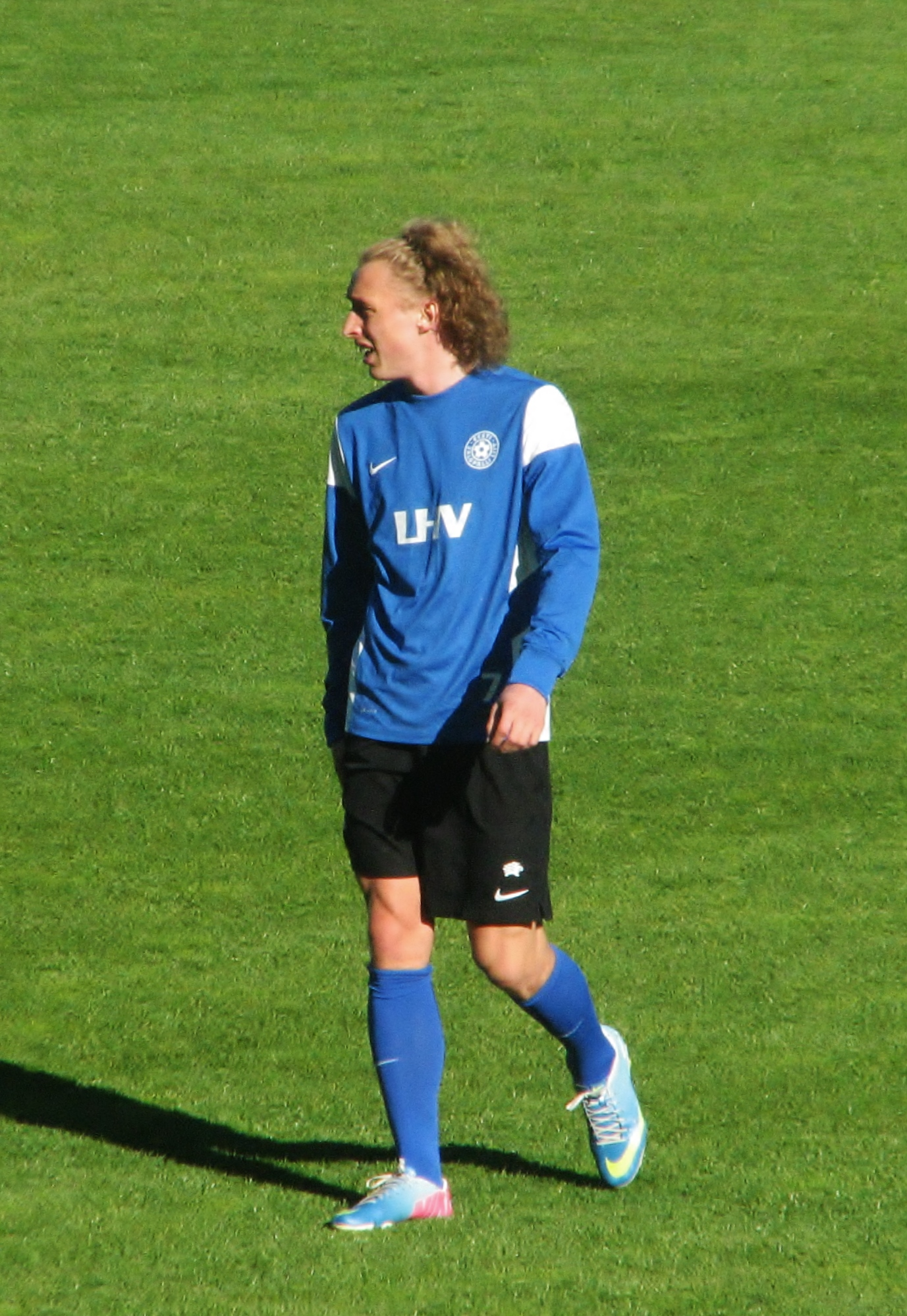 Rauno Alliku Eesti-Soome maavõistlusel Veritase staadionil